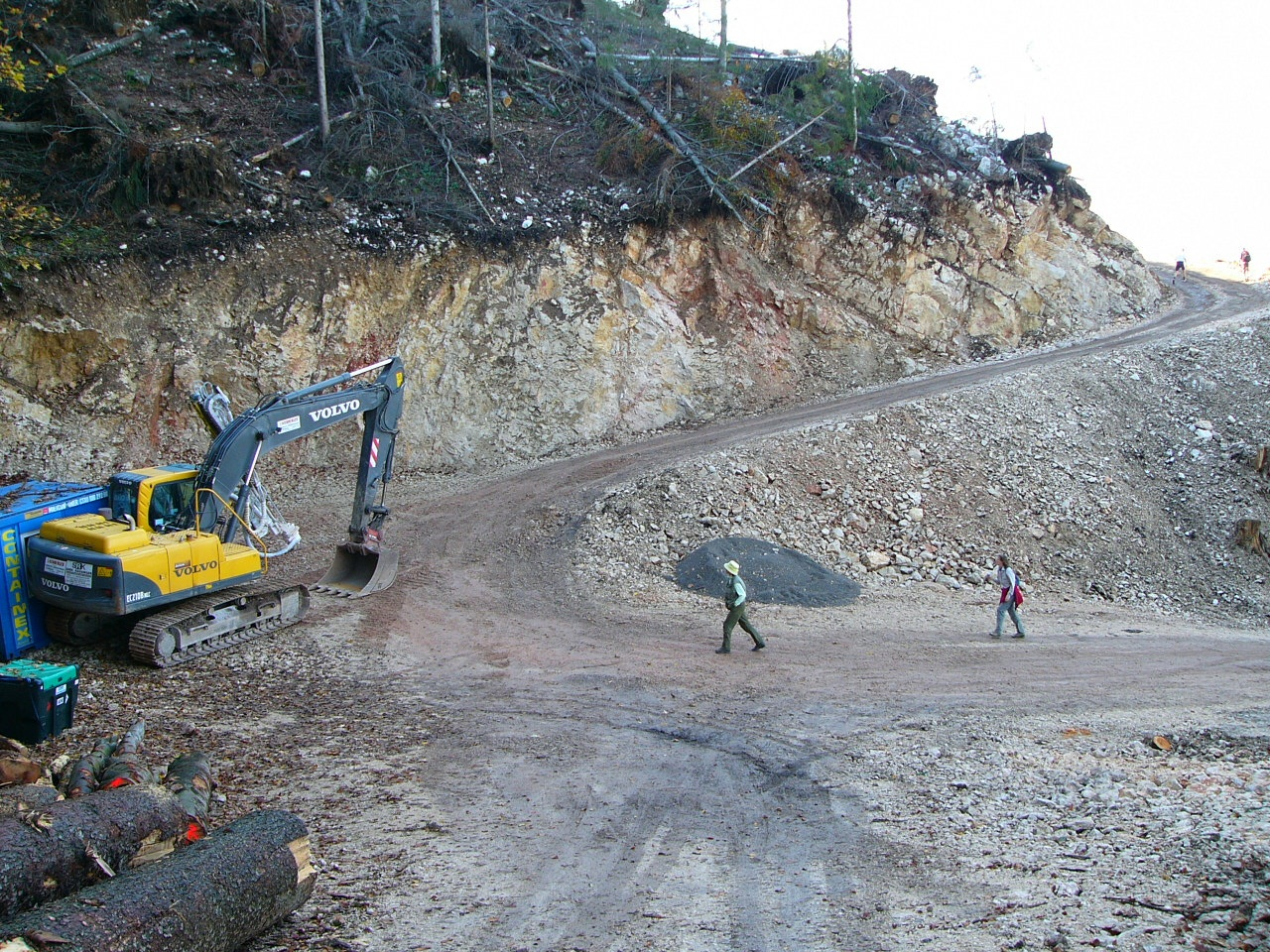 Bau einer Forststraße im Landschaftsschutzgebiet Untersberg